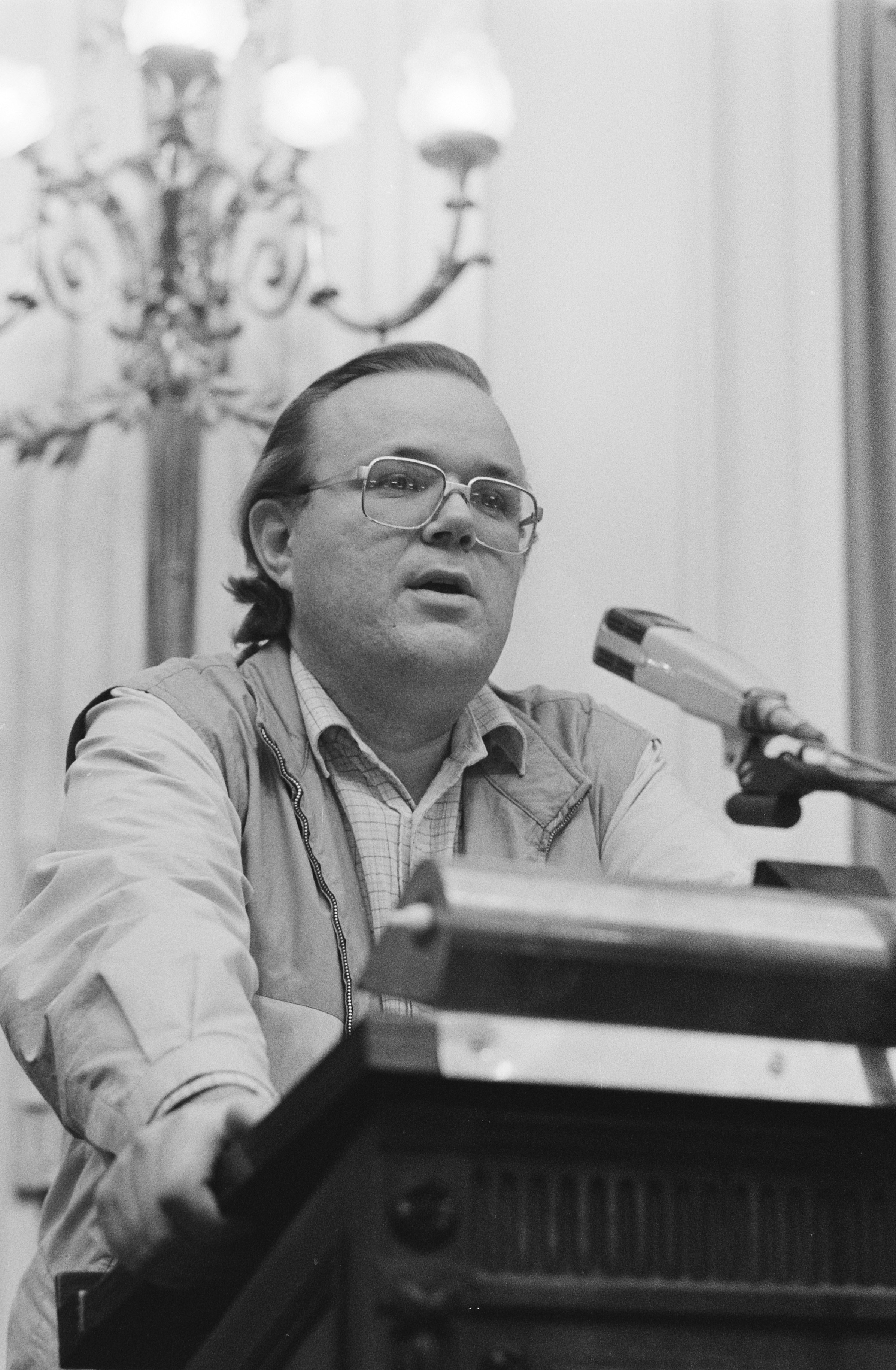 Collectie / Archief : Fotocollectie Anefo Reportage / Serie : Debat in de Tweede Kamer over het stemgedrag van Nederland in de VN inzake het bevriezen van het kernwapenarsenaal Beschrijving : Frits Castricum (PvdA) aan het woord Datum : 2 december 1982 Locatie : Den Haag, Zuid-Holland Trefwoorden : bewapening, parlementaire debatten, parlementariërs, portretten Persoonsnaam : Castricum, Frits Instellingsnaam : PvdA, Tweede Kamer Fotograaf : Croes, Rob C. / Anefo Auteursrechthebbende : Nationaal Archief Materiaalsoort : Negatief (zwart/wit) Nummer archiefinventaris : bekijk toegang 2.24.01.05 Bestanddeelnummer : 932-4254